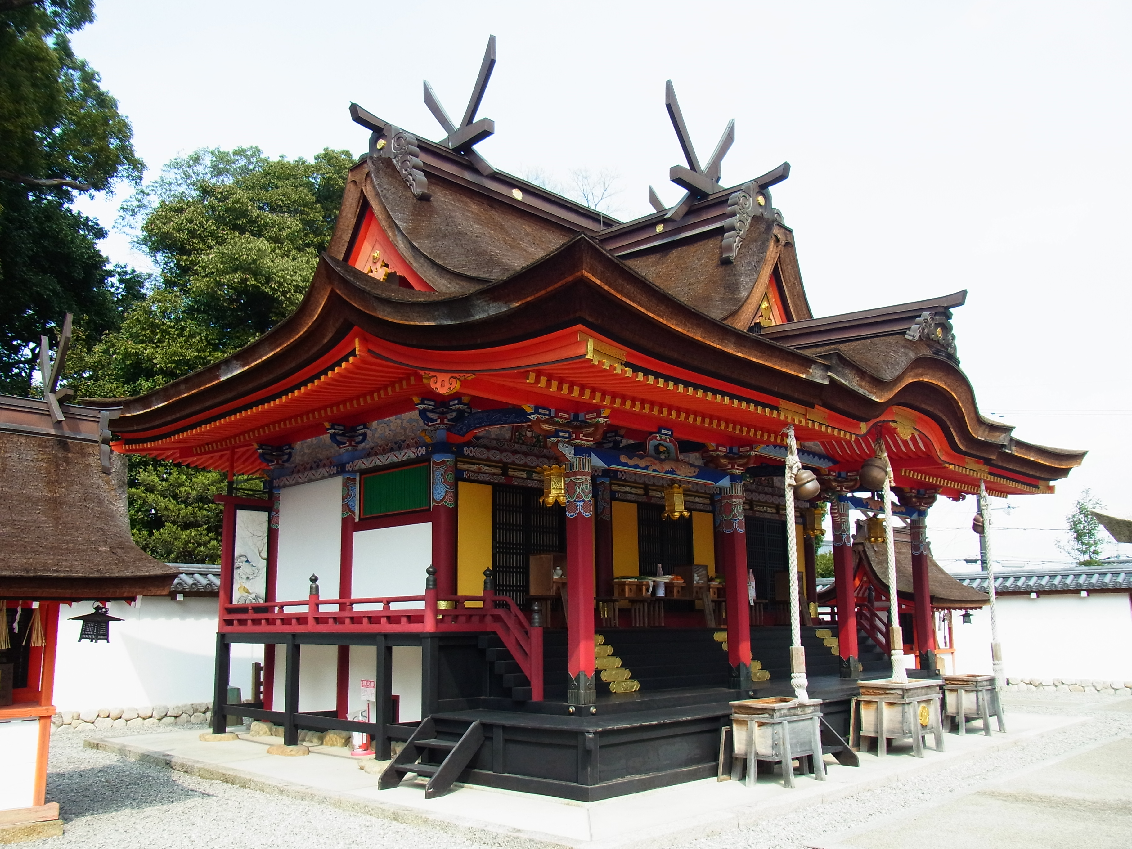 錦織神社の本殿 富田林市宮甲田町 2012.3.15